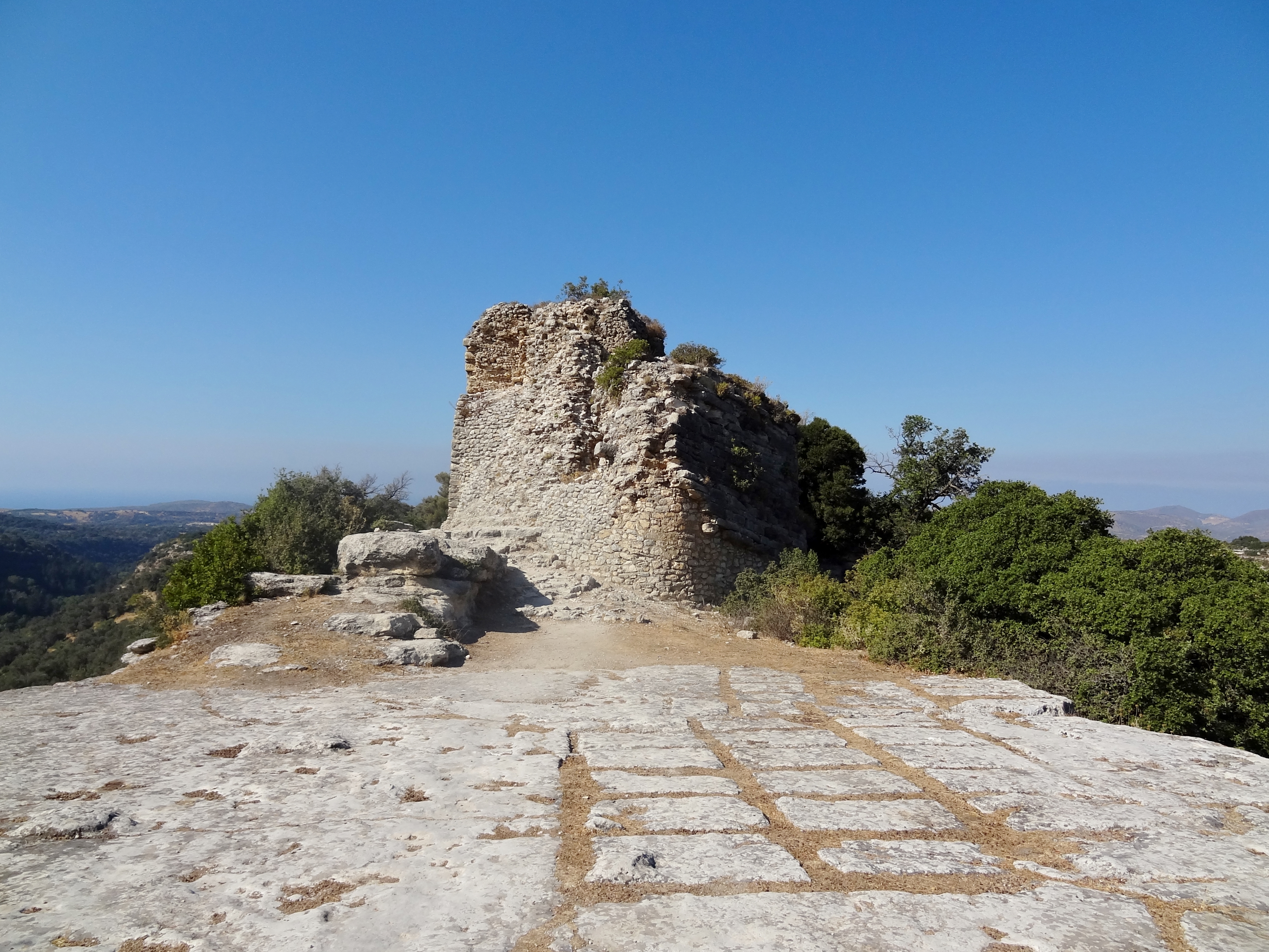 Akropolis von Eleutherna (Ἐλευθέρνα), Gemeinde Rethymno, Regionalbezirk Rethymno, Kreta, Griechenland